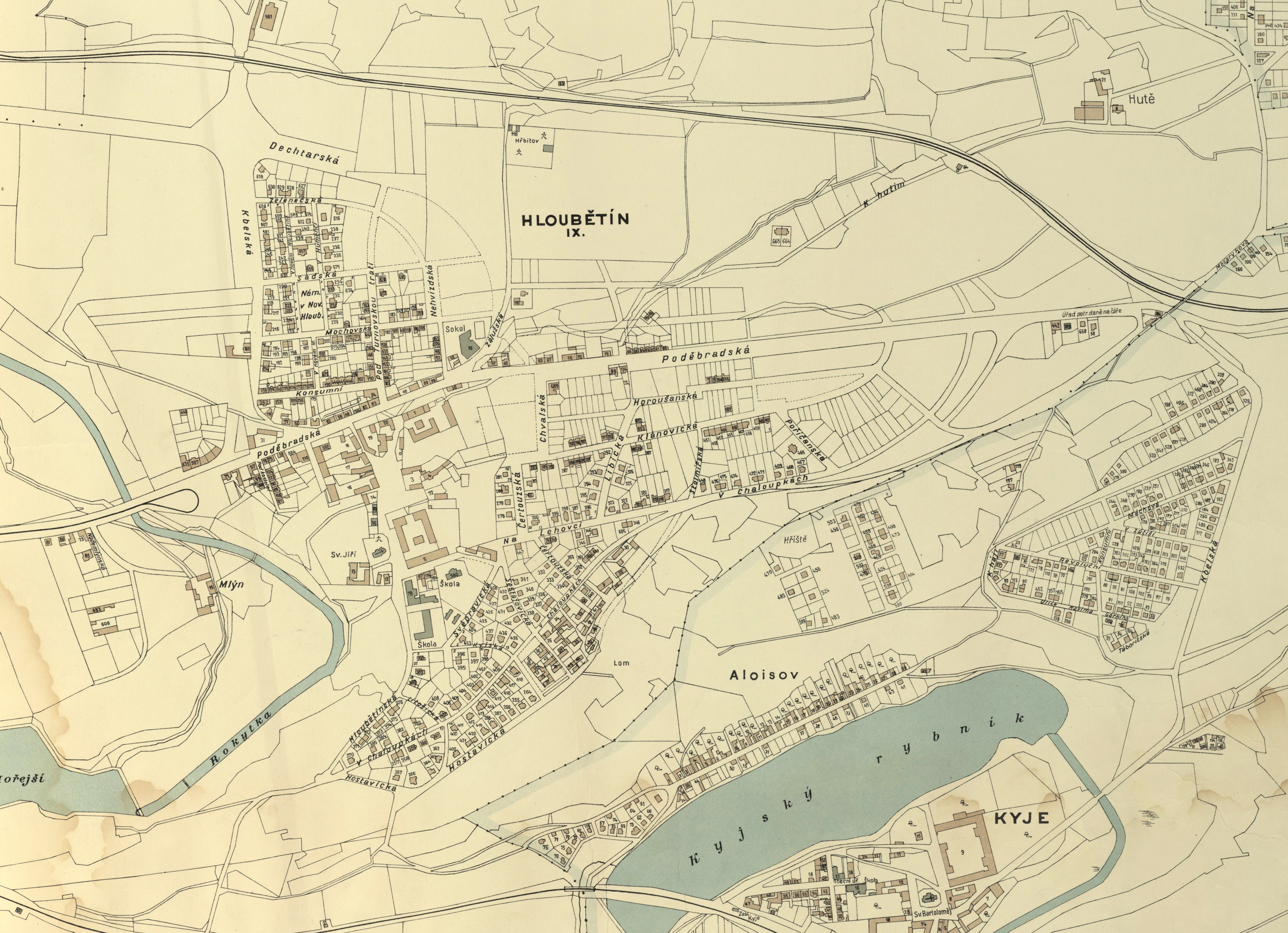 Hloubětín v roce 1938, výřez z mapového listu č.33, Orientační plán hlavního města Prahy s okolím (1938), nákladem Obce pražské, provedl stavební úřad hl. m. Prahy.